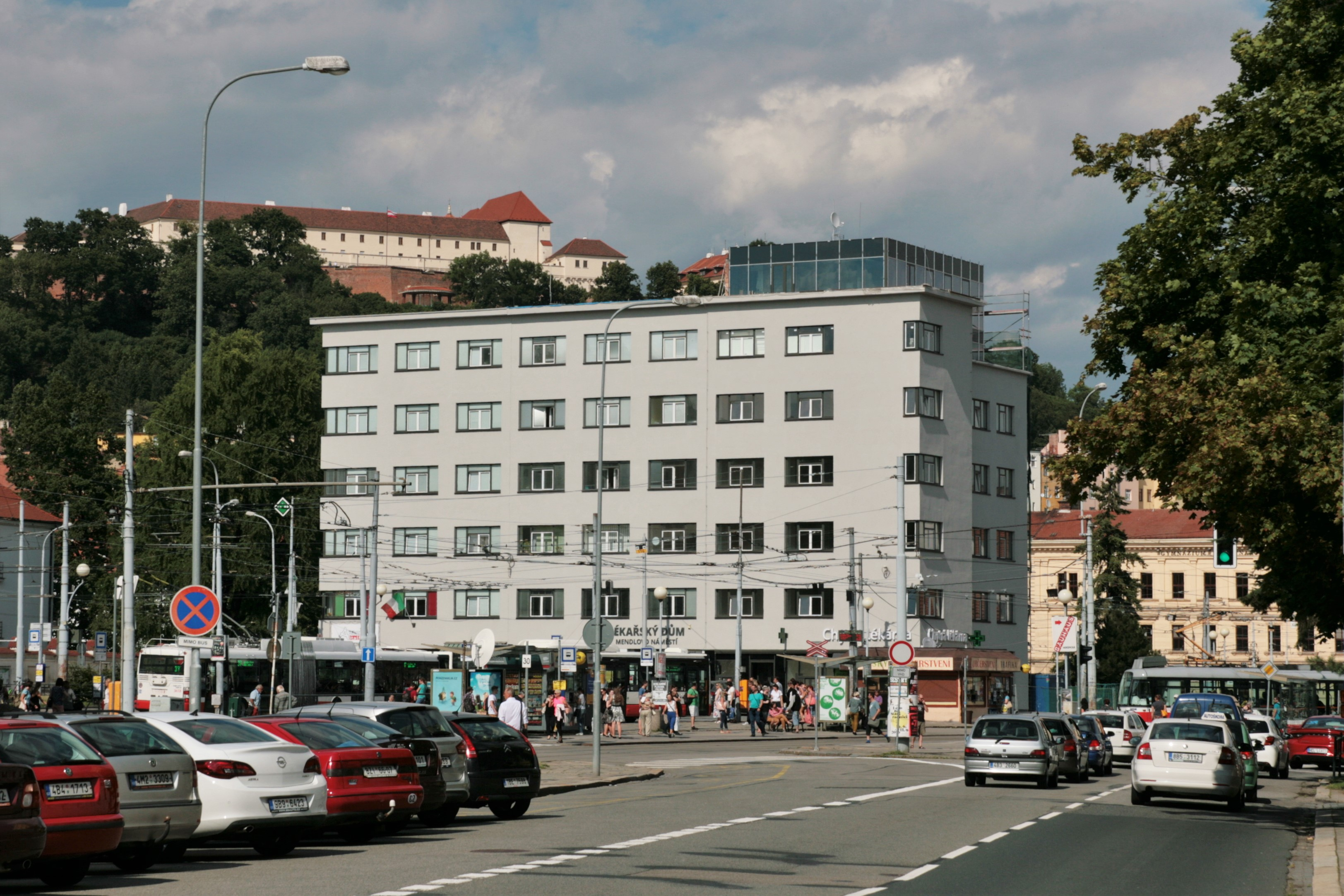 Blok domů z 30. let 20. století na Mendlově náměstí č.o. 16-19 v Brně. Pohled z Veletržní ulice, v pozadí vlevo Špilberk.